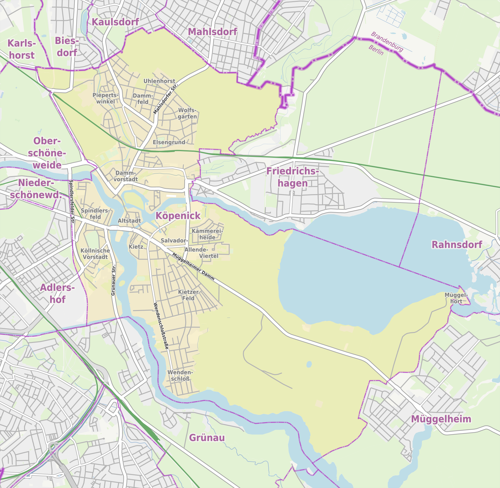 Übersichtskarte der Straßen und Ortslagen in Berlin-Köpenick